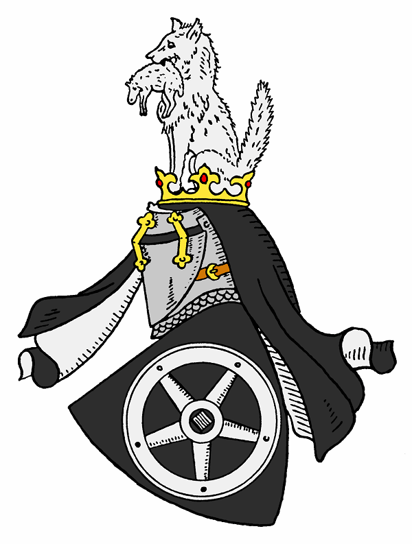 Wappen der von Berlichingen